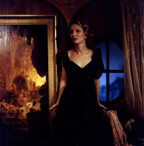 Nicole Garcia pendant les répétitions du film "Partenaires" de Claude d'Anna, scénario de Laure Bonin et Claude d'Anna, avec dans les rôles principaux : Nicole Garcia, Jean-Pierre Marielle, Michel Duchaussoy, Michel Galabru et Elisa Servier.